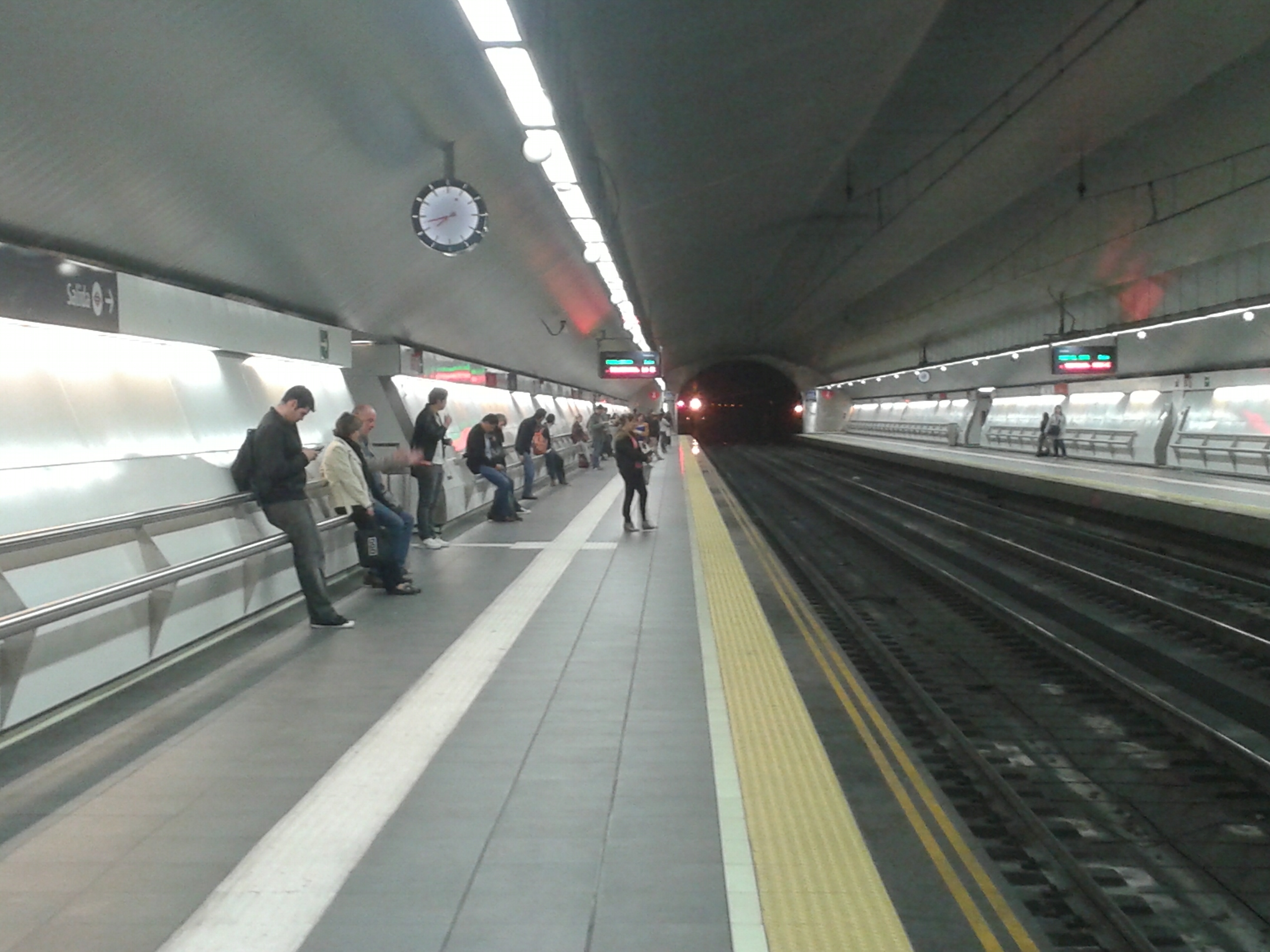 Andenes de la estación de Cercanías Renfe de Laguna.